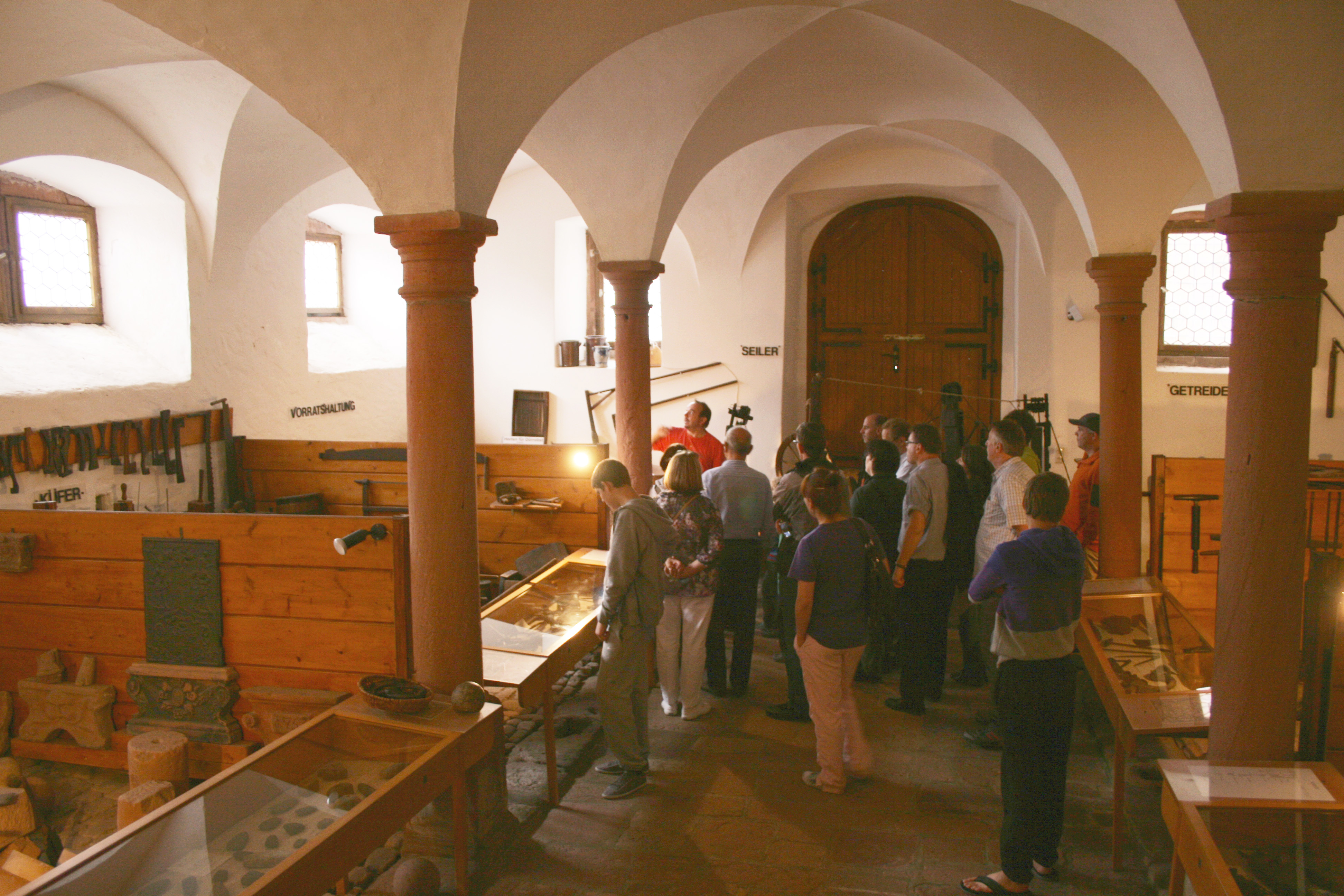 Blick in das Breubergmuseum im Keller des Johann-Casimir-Baus während einer Führung.